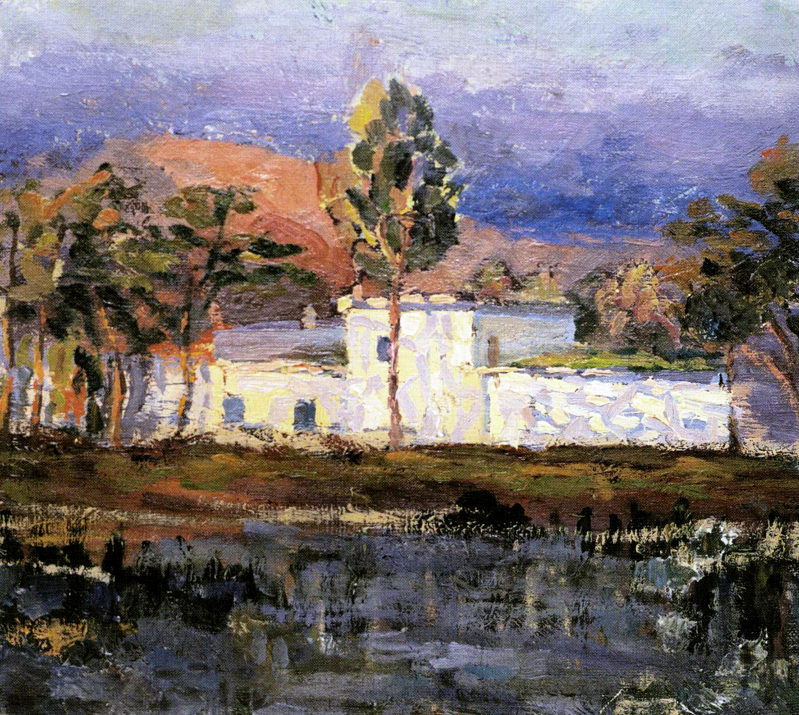 Bahruz Kangarli - Пейзаж с домом